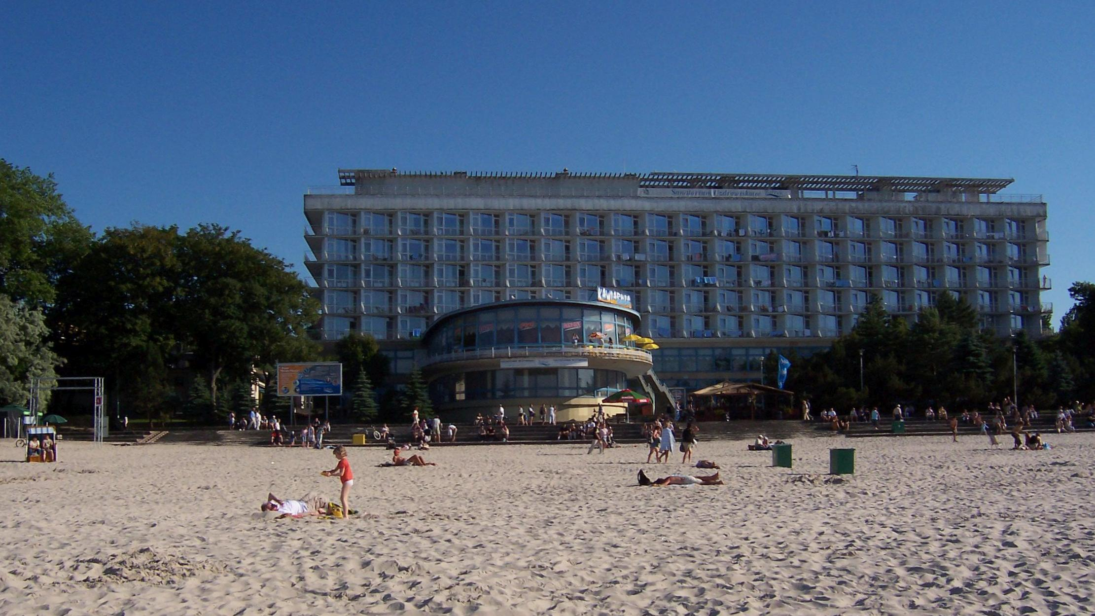 Sanatorium Uzdrowiskowe w Kołobrzegu